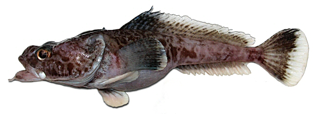 Stubbeard plunderfish Pogonophryne barsukovi Andriashev, 1967, female, Ross Sea, Antarctica